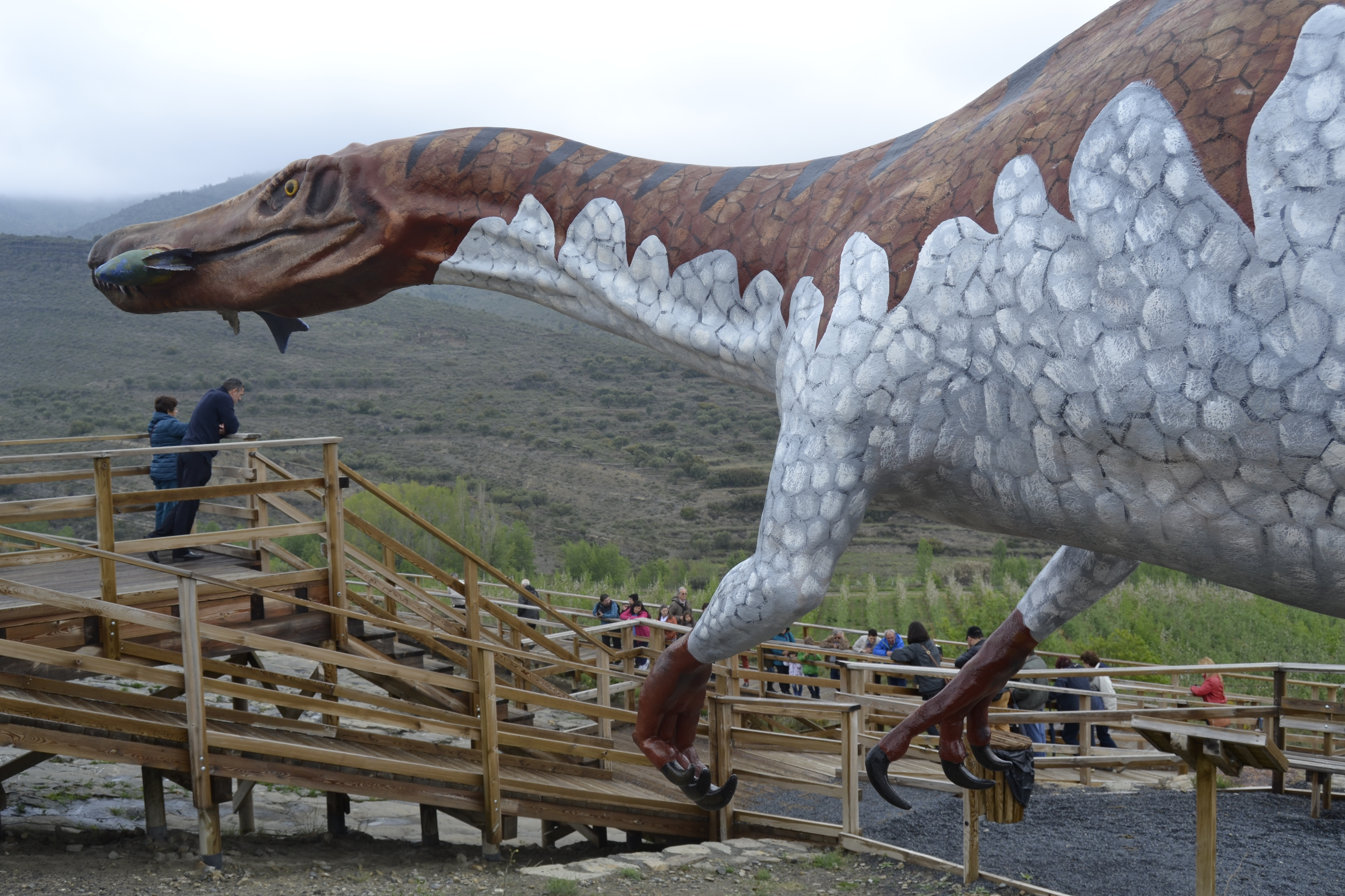 Baryonyx y visita guiada al fondo.